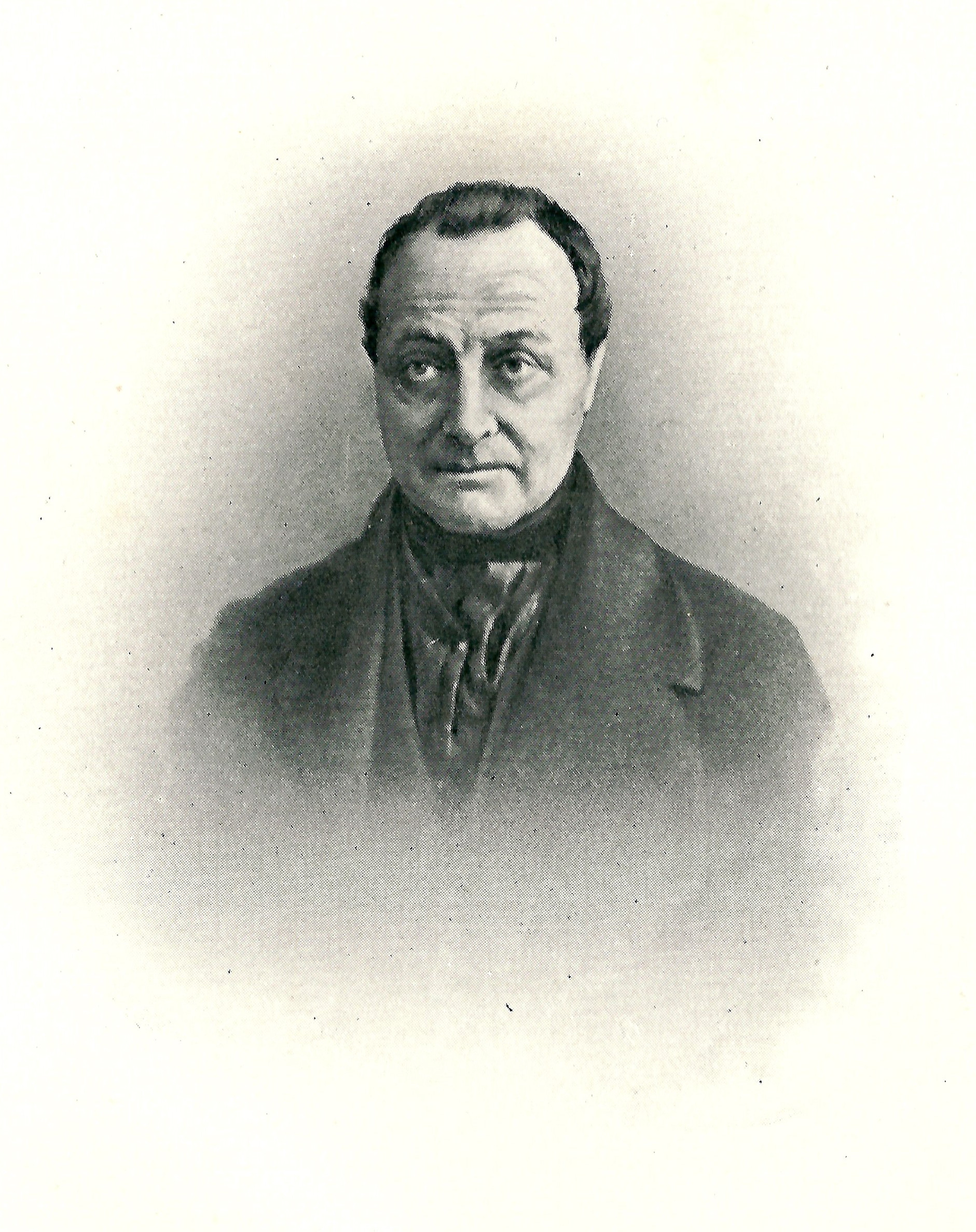 Portrait de Auguste Comte.